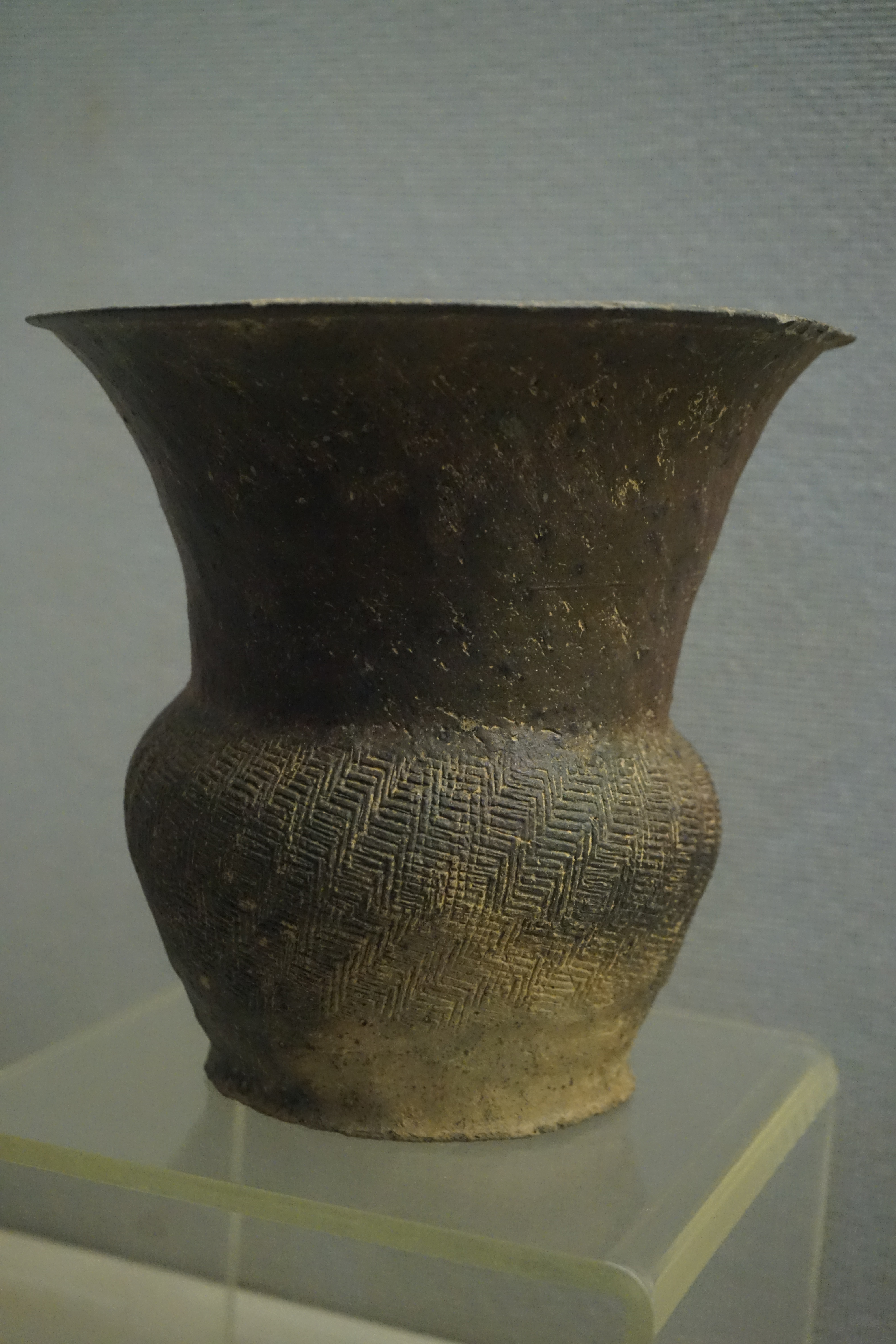 中文（中国大陆）: 印纹硬陶尊 西周 绍兴柯桥街道余家弄村出土